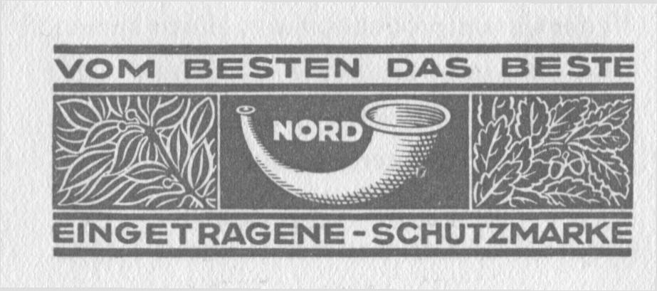 frühere Schutzmarke Fa. Ludwig Povel (gest. 1938), Fa. Povel/Nordhorn